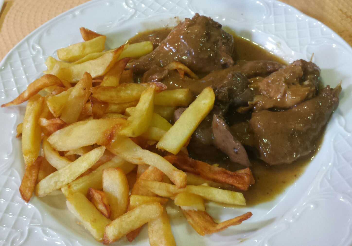 Conejo estofado provincia de Cádiz, España.